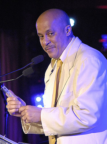 Hilario Duran